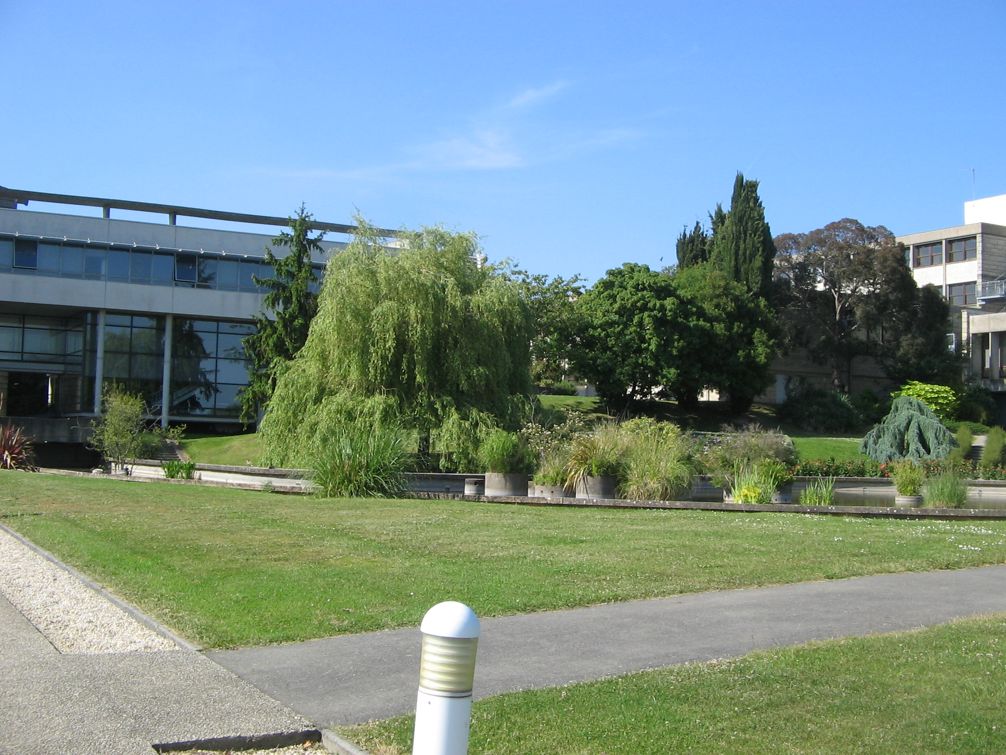 Une partie du campus de Beaulieu, Rennes, France